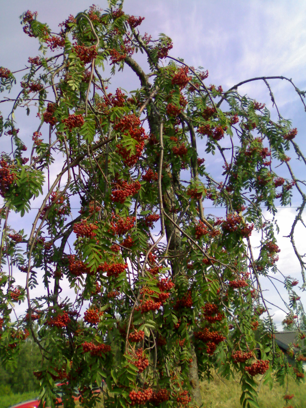 Pihlajapuu, pihlajanmarjat Sorbus aucuparia